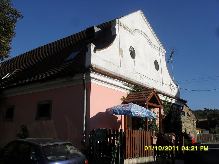 Velké Přílepy, budova restaurace Špejchar ze 16. století.